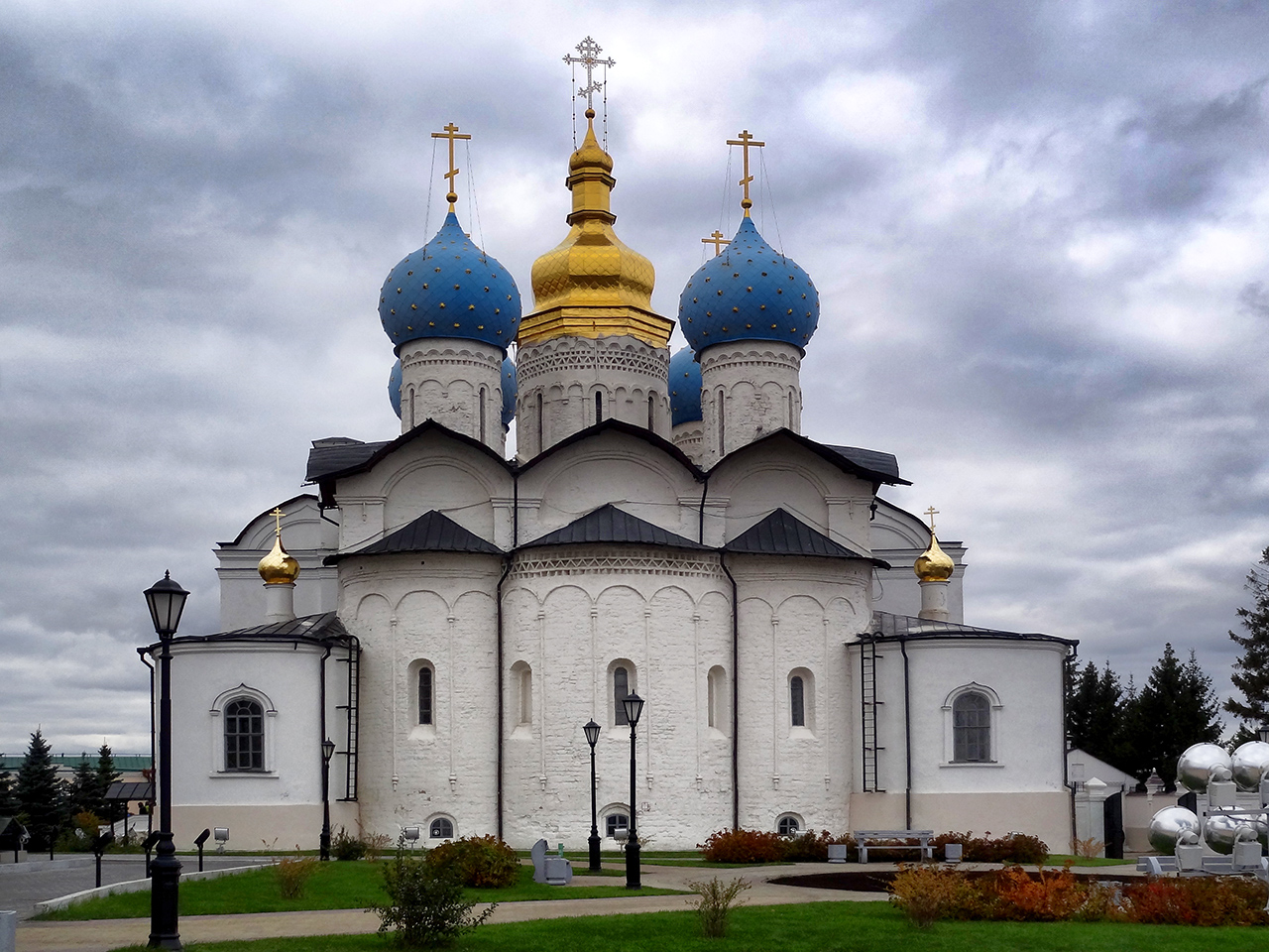 Казань. Благовещенский собор в Кремле